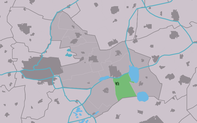 Kaartsje fan himrik fan Sumar